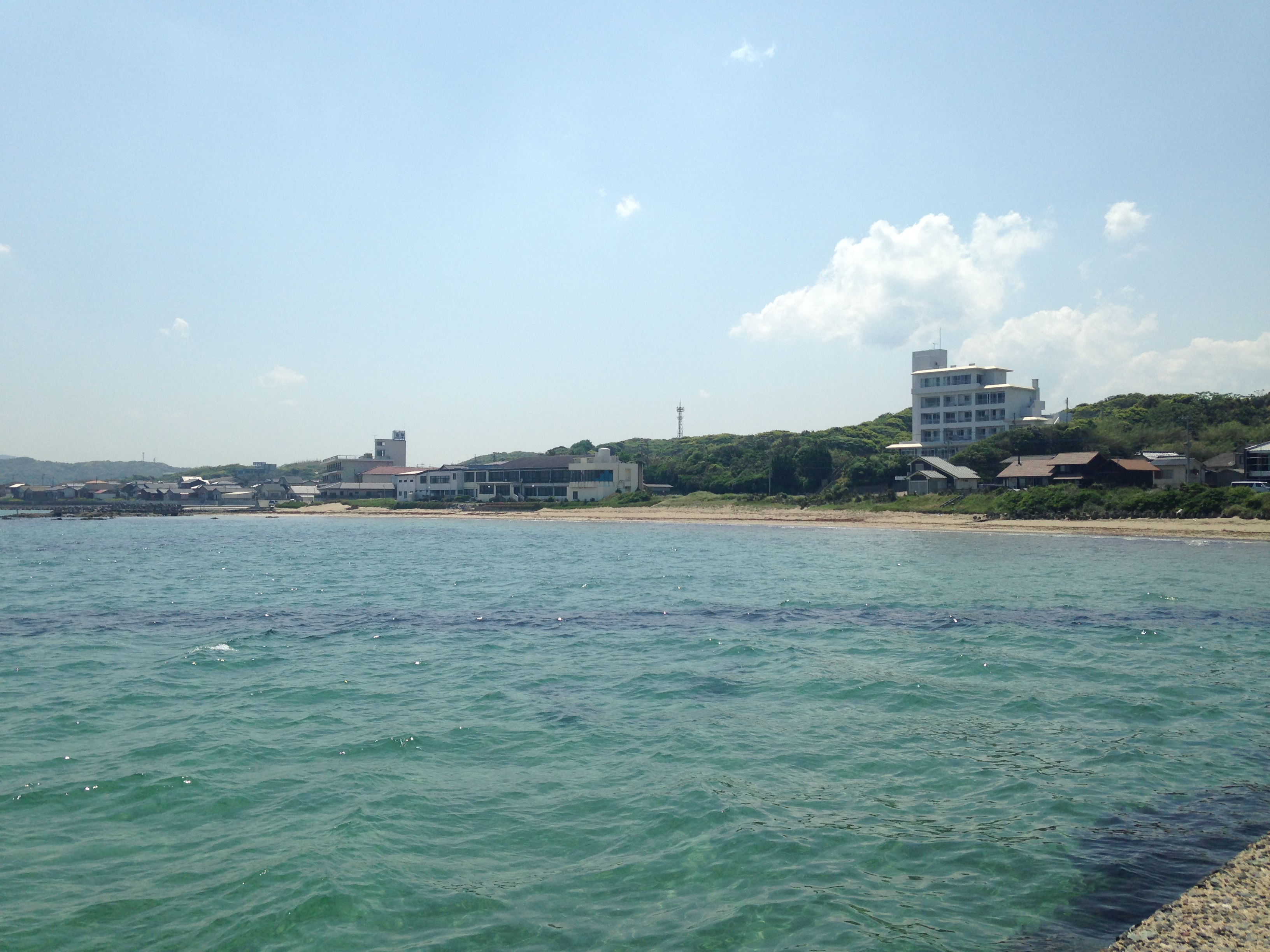 神湊港より望む神湊海水浴場